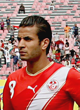 Khaled Korbi, joueur tunisien de football